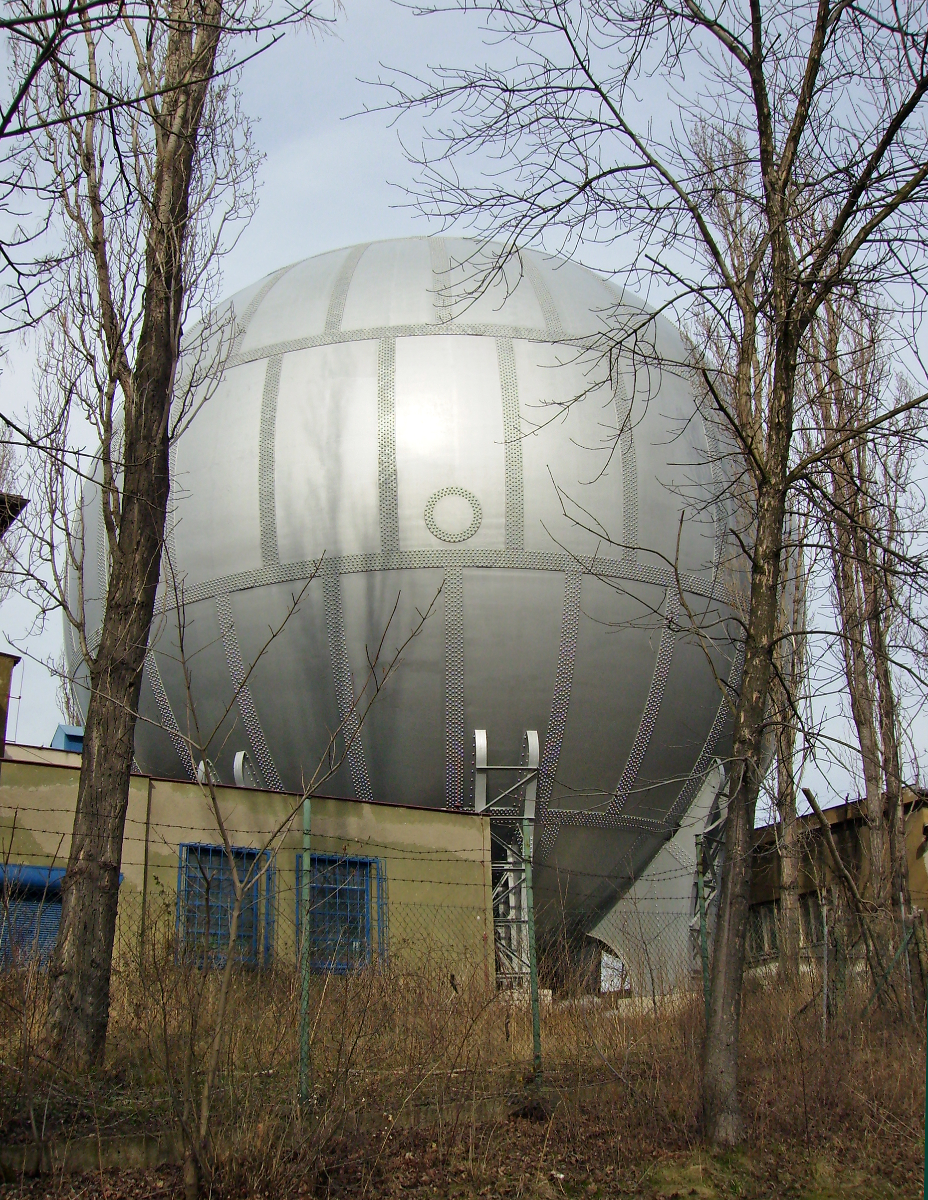 Libeňský plynojem, kulturní památka na Palmovce v Praze 8.